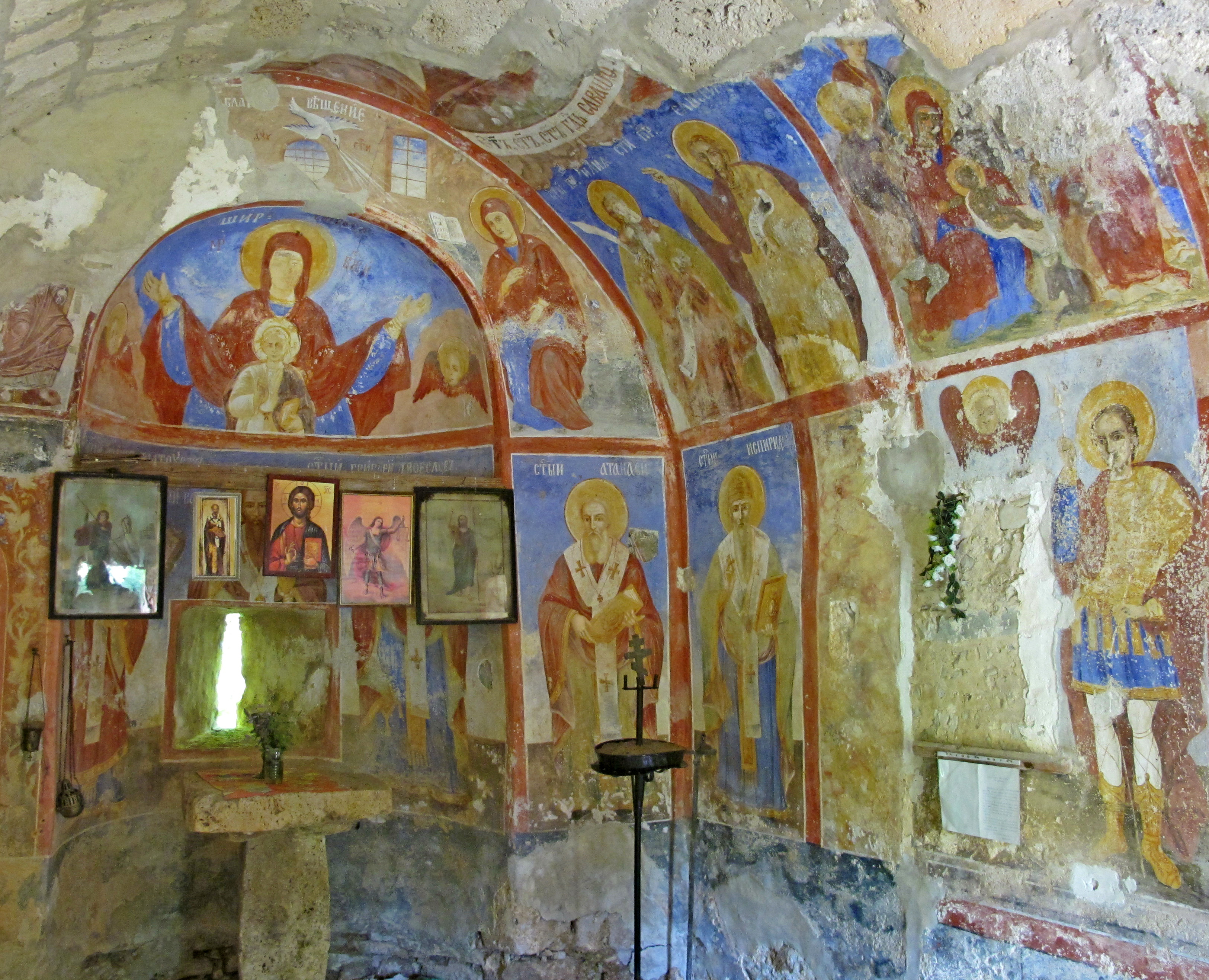 Crkva svetog Arhangela Mihaila u Boljev Dolu kod Dimitrovgrada, na Staroj planini podignuta je oko 1600. godine. Nalazi se maloj udolini, okruzena stenama, pa se moze videti samo iz neposredne blizine.